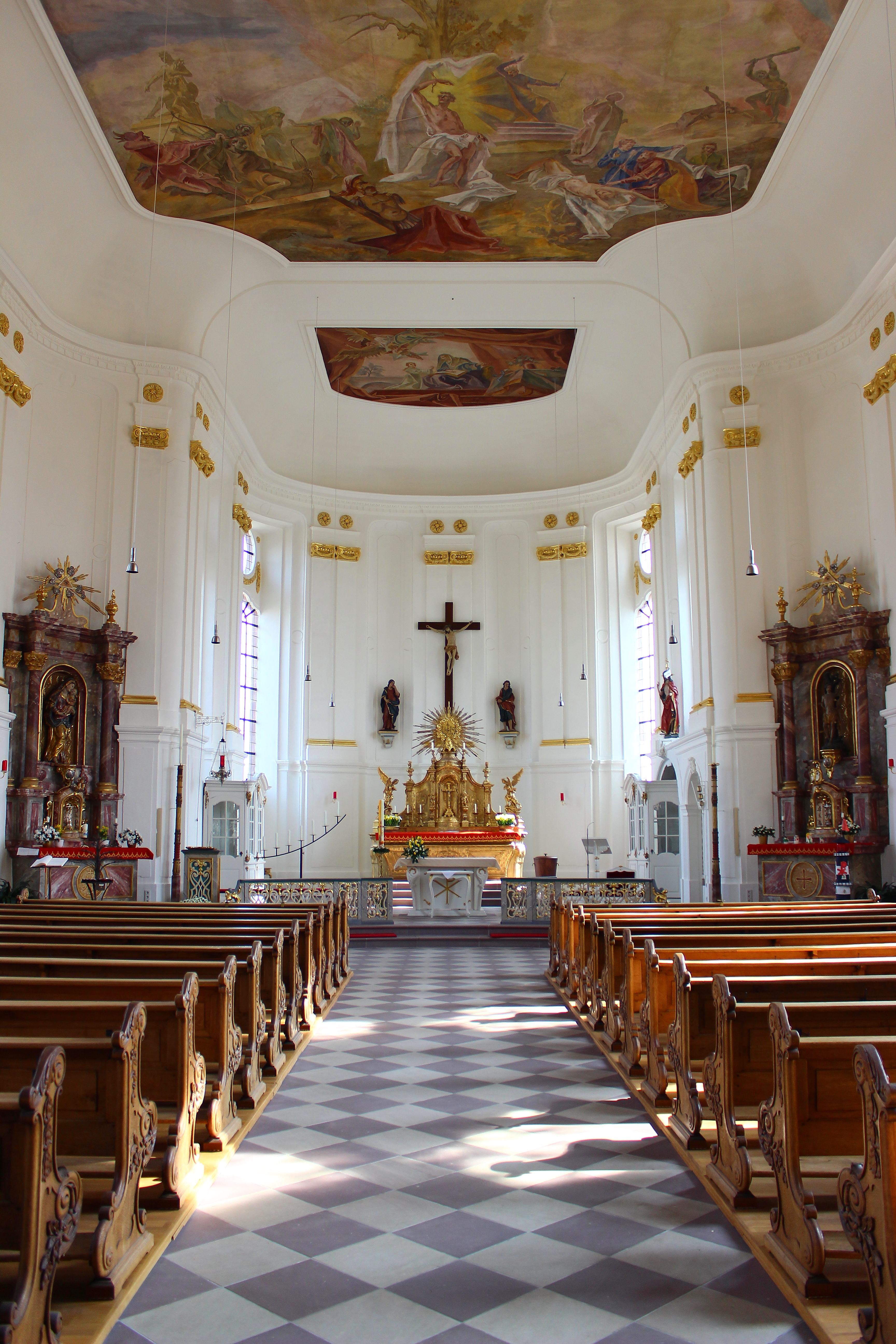 Blick ins Innere der Schlosskirche in Blieskastel, Saarland